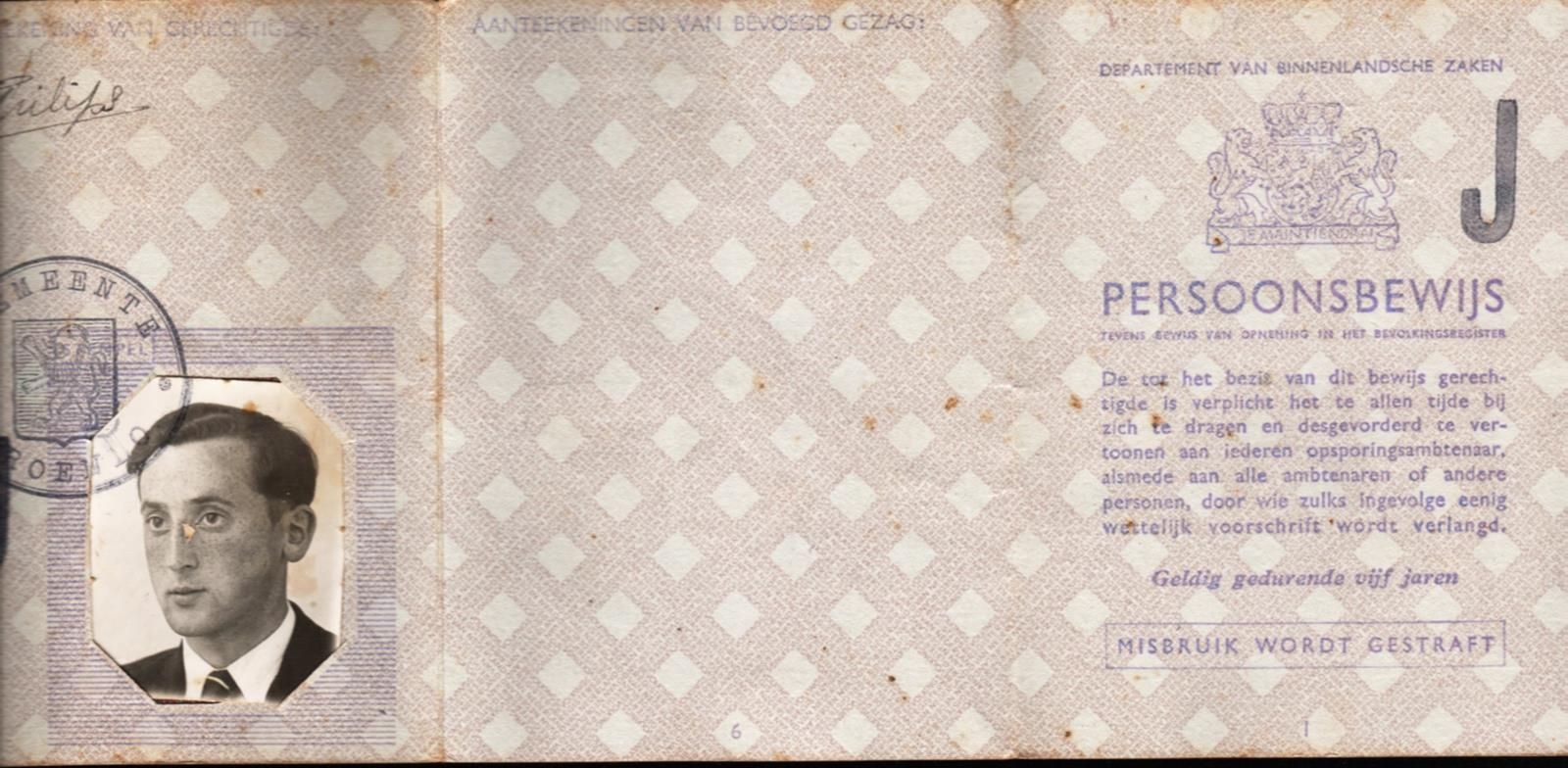 Het persoonsbewijs van Leo Philip(s) uit Groenlo met daarin rechts de J, die aangaf dat hij van Joodse komaf was. (